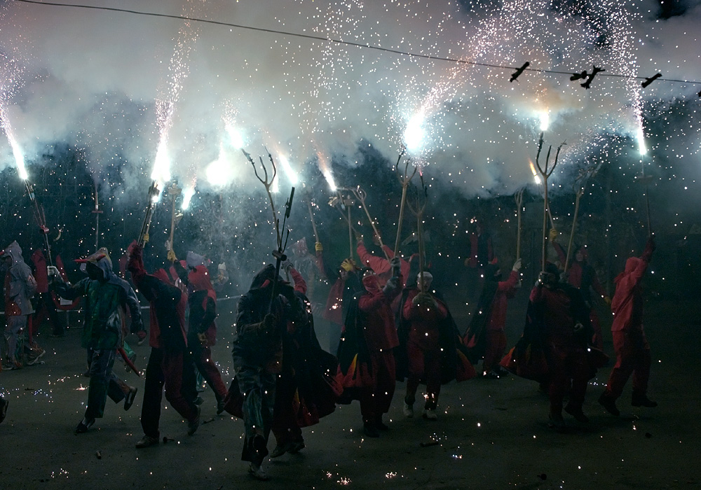 Correfoc diablos, Canyelles, Barcelona, Spain 2006